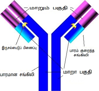 பிறபொருளெதிரி ஒன்றின் எளிய கட்டமைப்பு